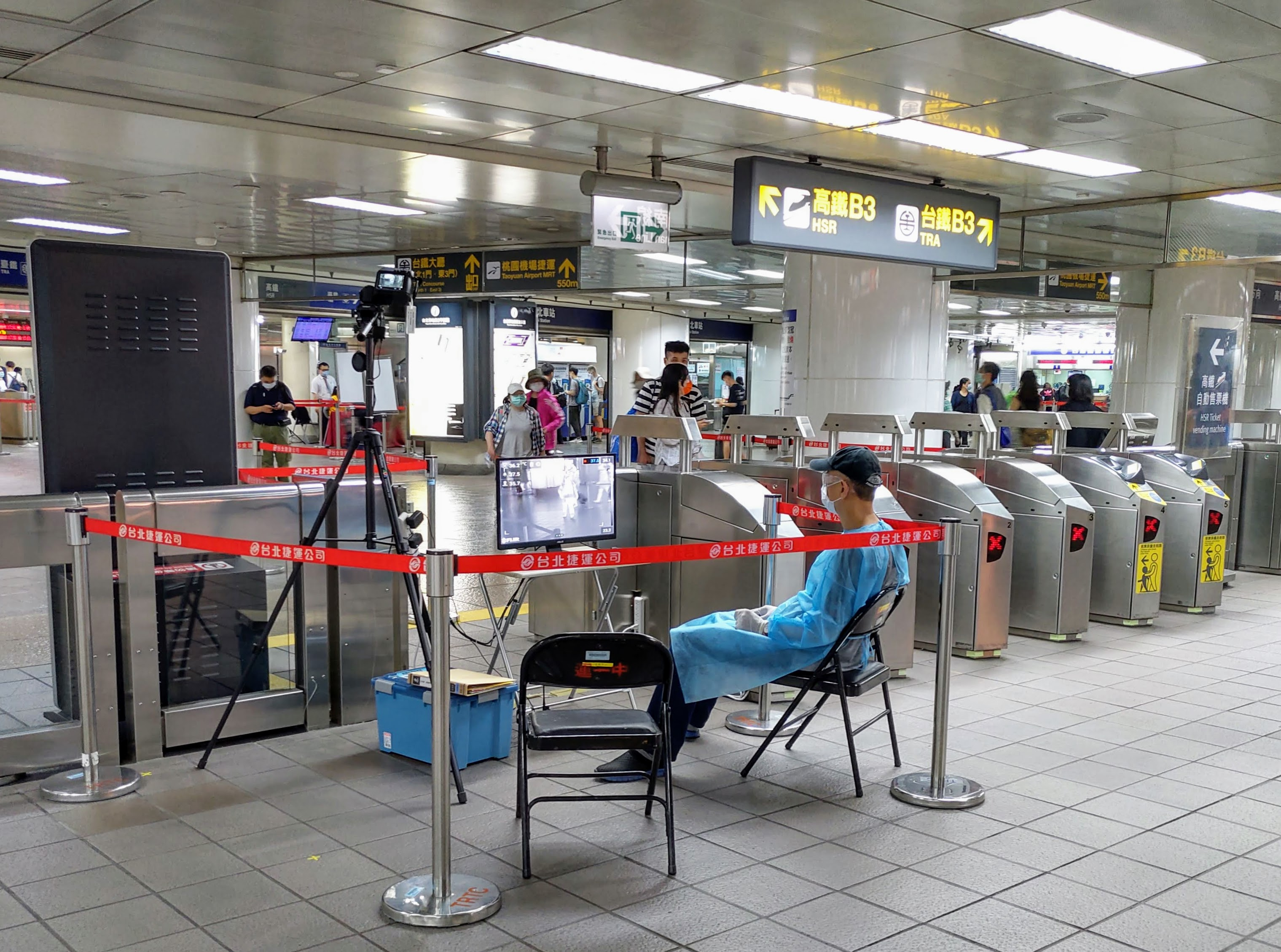 台北捷運台北車站淡水線自動閘門前，紅外線體溫監測站。